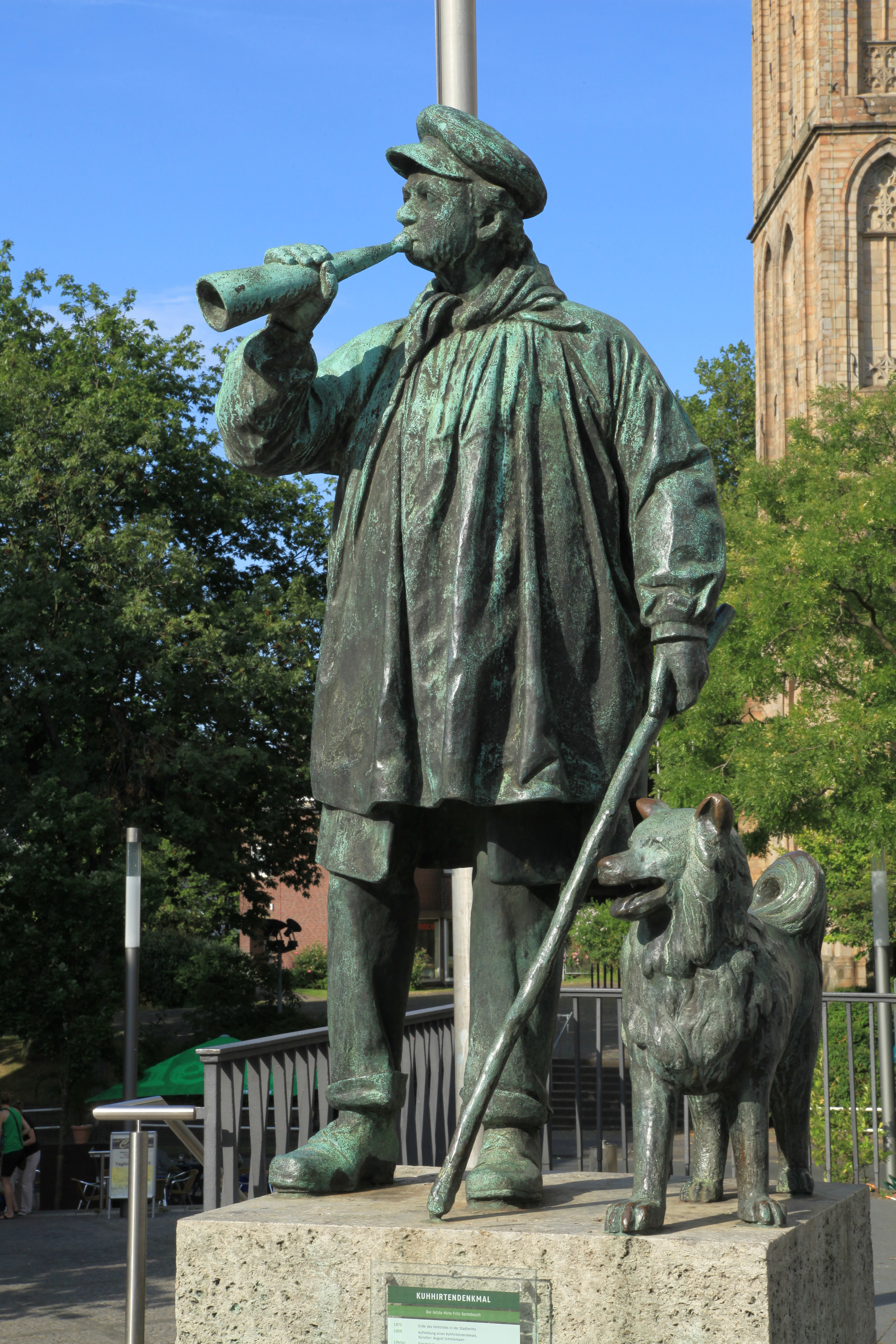 Kuhhirtendenkmal von August Schmiemann, Bongardstraße in Bochum